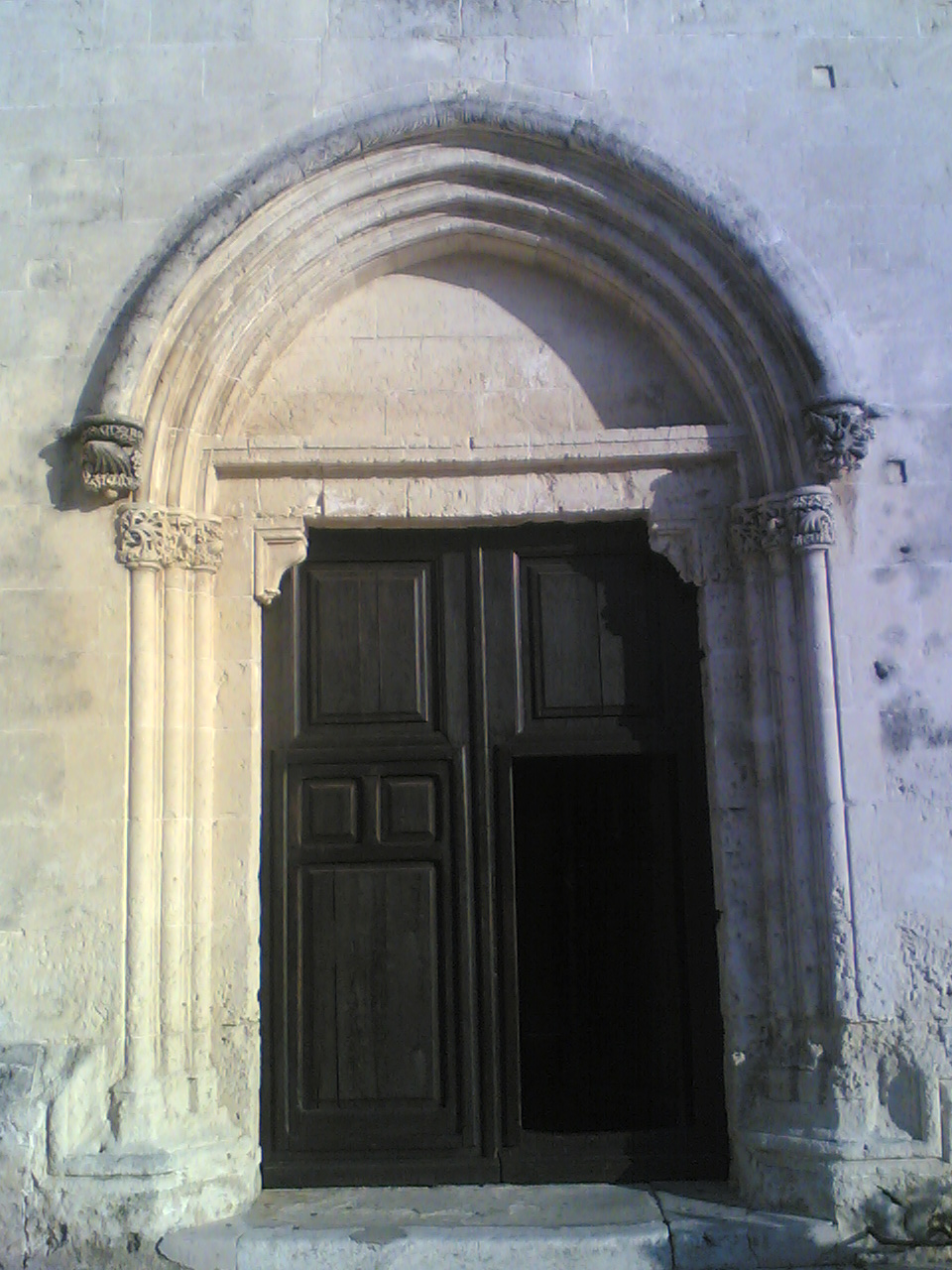 Assemini: chiesa di San Pietro, facciata, il portale maggiore. Autore: Pietro Mudu Licenza d'uso: GFDL Categoria:Immagini esclusivamente in GNU FDL